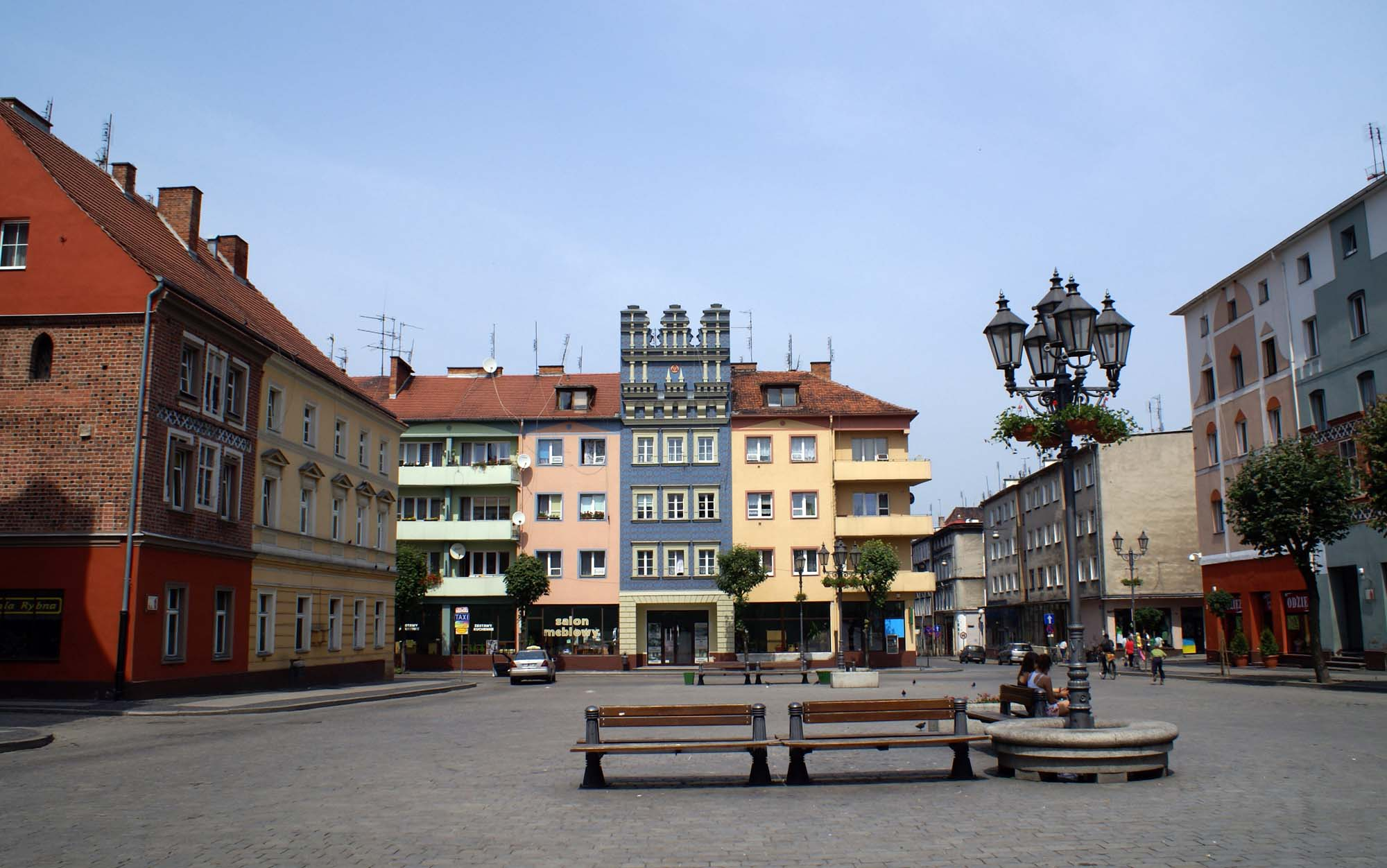 Brzeg, Stare Miasto